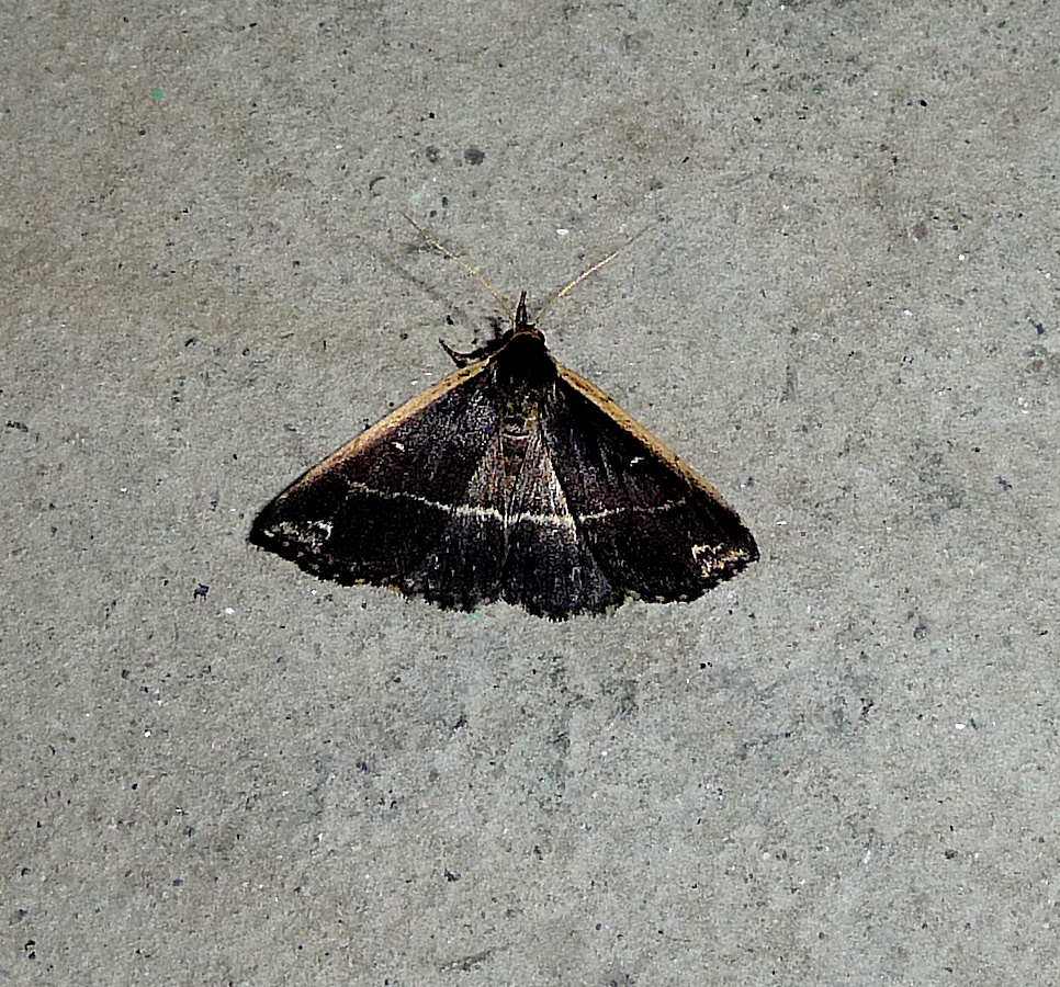 Noctuidae, Herminiinae(fan foot). Adrapsa ablualis